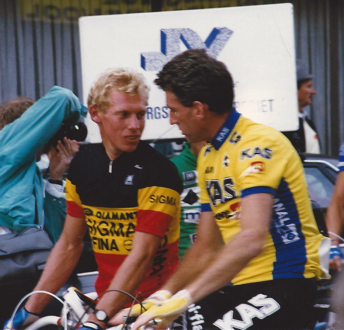 ETIENNE DEWILDE et SEAN KELLY